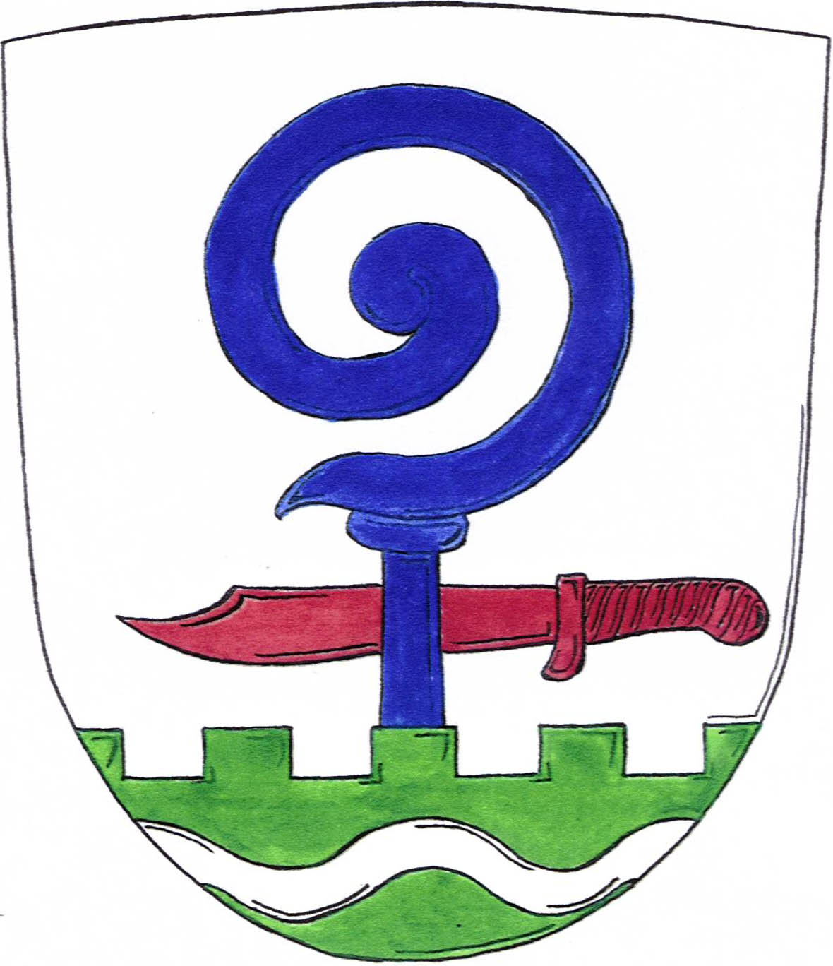 Vlajka obce Bílenice